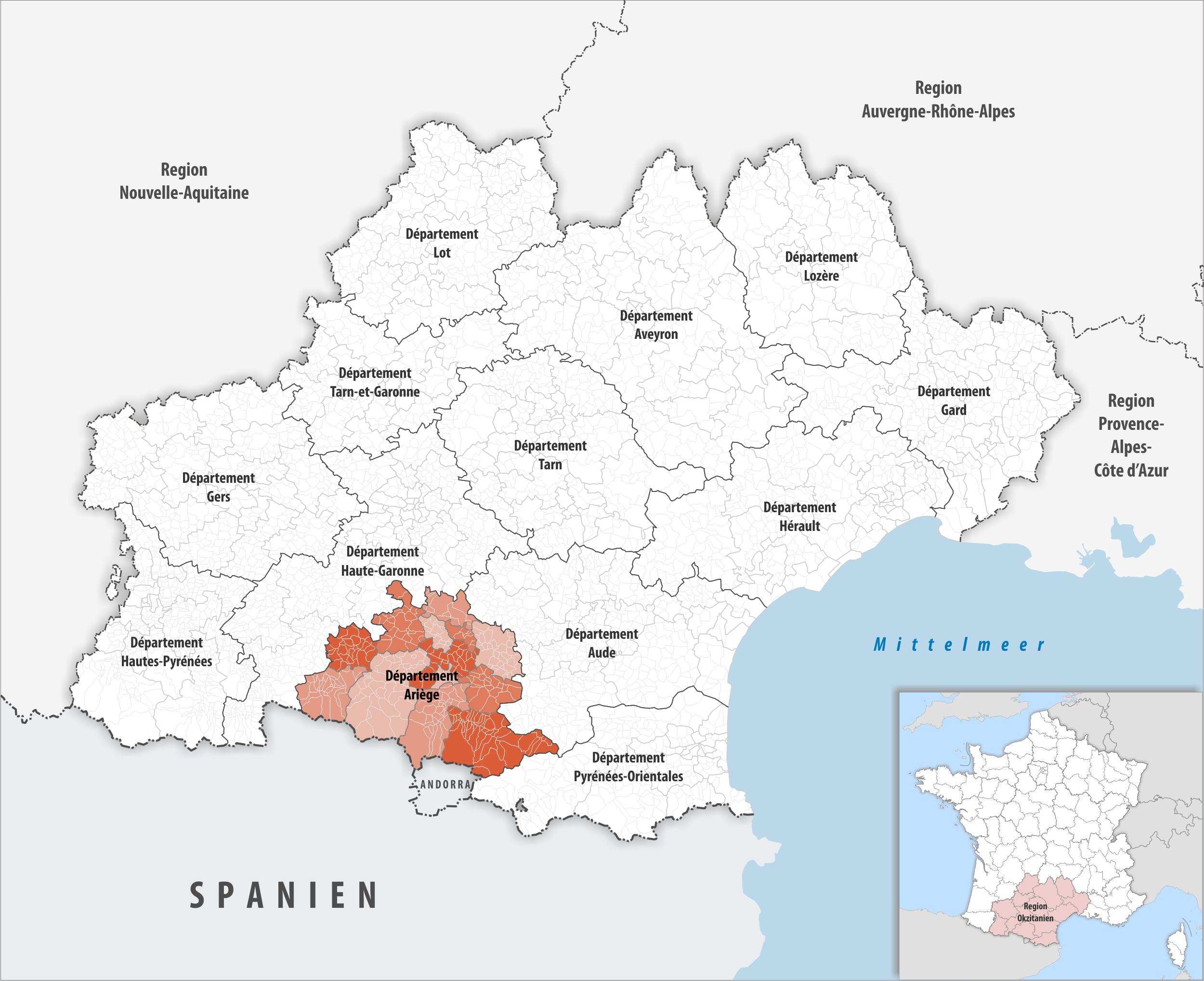 Lage des Departements Ariège